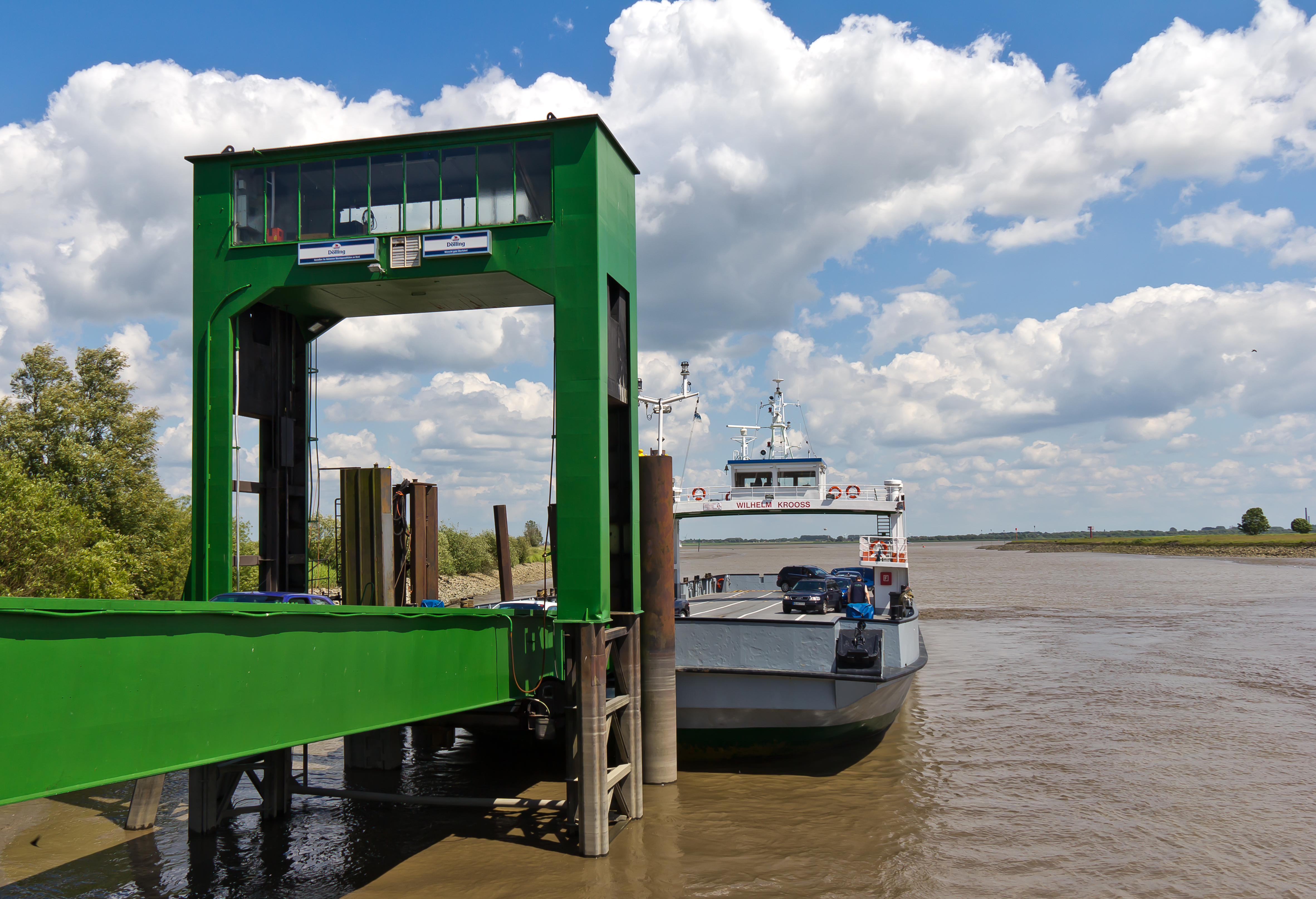 Überfahrt mit der Elbfähre Wischhafen-Glückstadt. Die Wilhelm Krooss am Schiffsanleger auf Wischhafener Seite